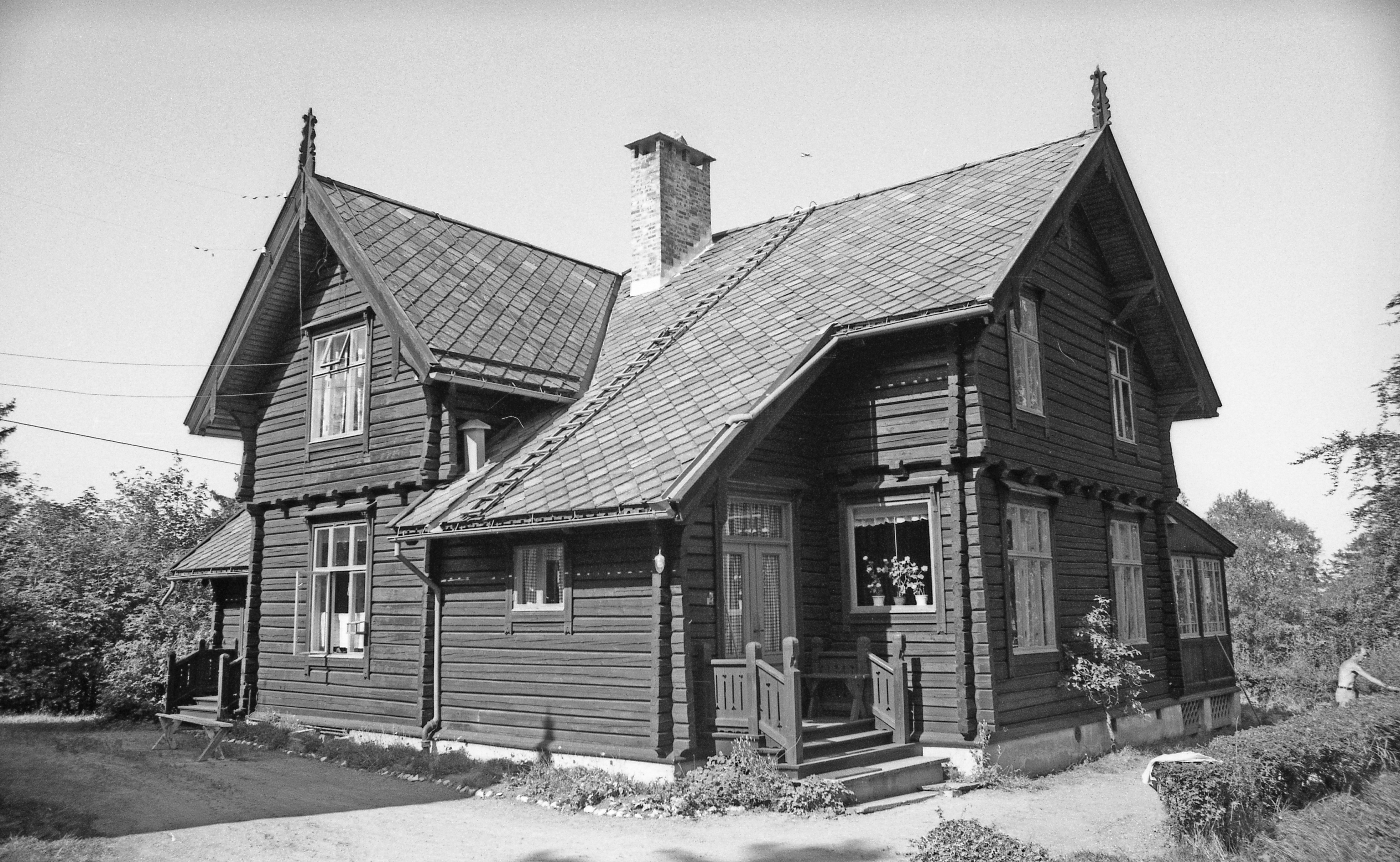 Kvernbakken er en 1 1/2 etasjes villa i en behersket nasjonalromantisk dragestil, oppført 1902 (ark Karl Norum). Huset var et ferdighus, oppført av maskinlaftet tømmer levert av firma Jacob Digre i Trondheim. Bygningskroppen består av to tverrstilte, asymmetriske bygningsvolumer. Mot hagen har huset en stor glassveranda, som fungerte som hagestue. I tillegg til hovedbygningen finnes det på eiendommen et uthus på 1 1/2 etasje og en dukkestue. Alle bygningene er fredet. Eiendommen var opprinnelig en parsell av Skovgård, fradelt 1902 og solgt til Christian Matheson, som overlot stedet til datteren Astrid Matheson, gift med øyenlege Fredrik E. Bødtker. Eiendommen omfattet opprinnelig 14 dekar, og Bødtker oppførte et landsted her. Etter Bødtkers død arvet datteren Sophie Bødtker eiendommen. Den ble etter hennes død overtatt av nevøen Tobias Lund, men Statens Vegvesen eksproprierte eiendommen i 1986 i forbindelse med utvidelse av E6 og bygging av Grilstadtunnelen# Det var planer om å rive bebyggelsen, men dette ble forhindret bl.a. som følge av storstilt innsats fra Fortidsminneforeningen# Bebyggelsen ble fredet 1990 og eiendomsretten ble overdratt til Fortidsminneforeningen. Huset ble da nennsomt restaurert og gitt en forsiktig tilpasning til moderne boligstandard. Bygningen har siden vært leid ut. Kilde: Trondheim Byleksikon 2008. Sted / Place: Grilstadvegen 4, Ranheim (Gnr. 17/12) Eier / Owner Institution: Trondheim byarkiv, The Municipal Archives of Trondheim Arkivreferanse / Archive reference: Tor.H43.P1.F5418, film 21 Merknad: Fra Byantikvarens negativsamling